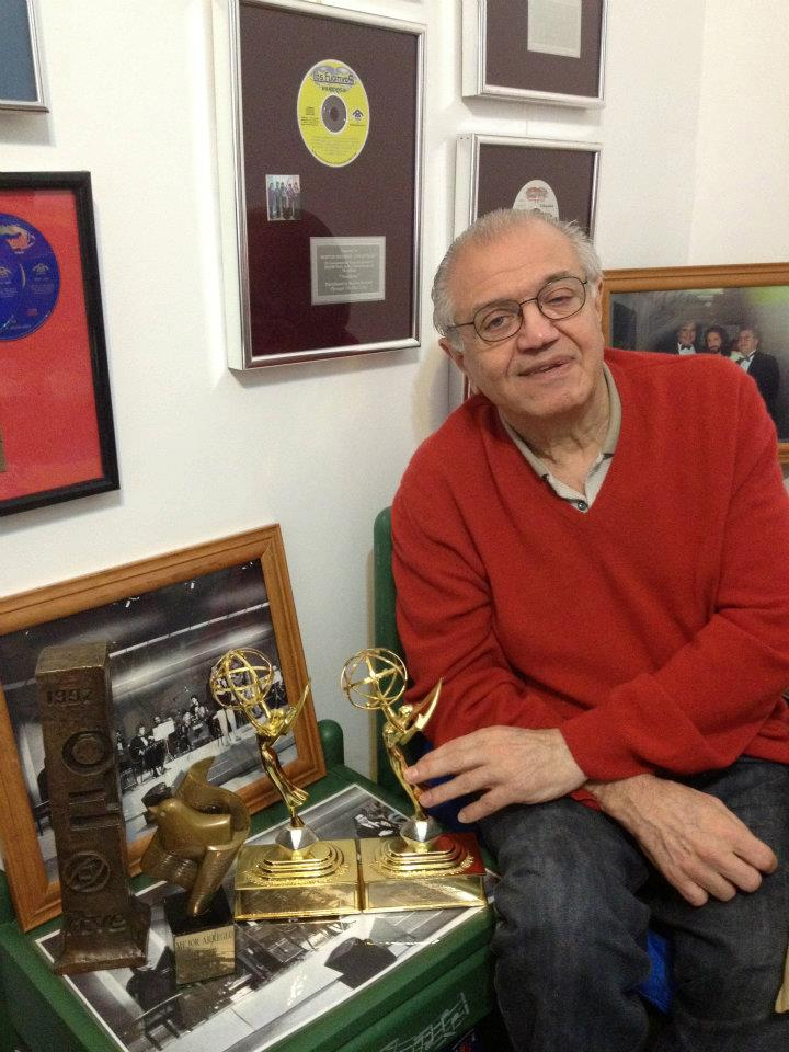 Pepe Motta junto a sus premios Emmy por su trabajo musical en TV en los Estados Unidos; el premio de España en el festival OTI de la canción; Mejor arreglo musical en el festival OTI en Estados Unidos y reconocimiento por mas de 150.000 ventas del disco "Ilusiones", con Los Fugitivos, en Los Angeles, EE.UU.